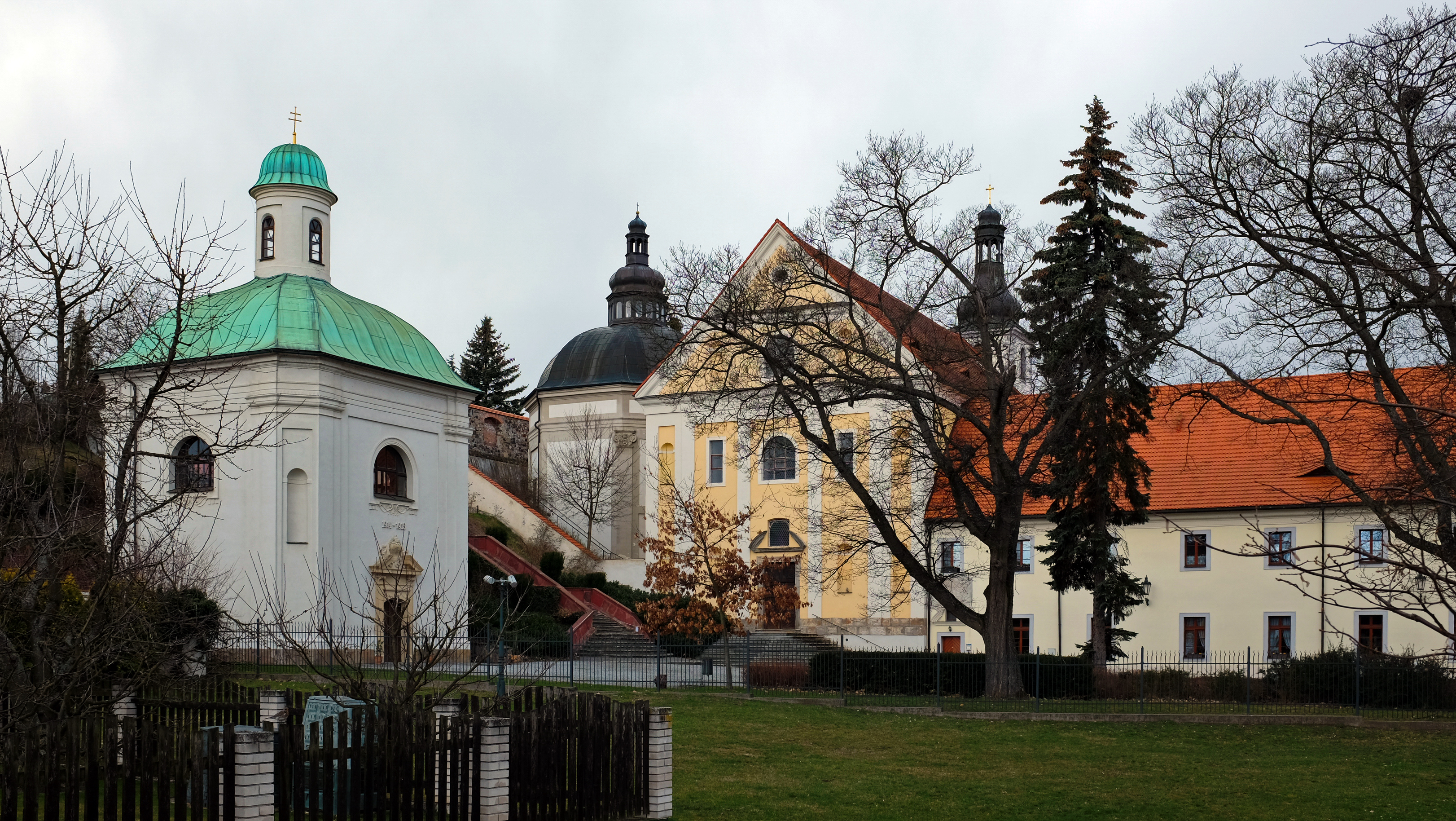 Klášter piaristů, Staroměstská 141, Ostrov (okres Karlovy Vary).